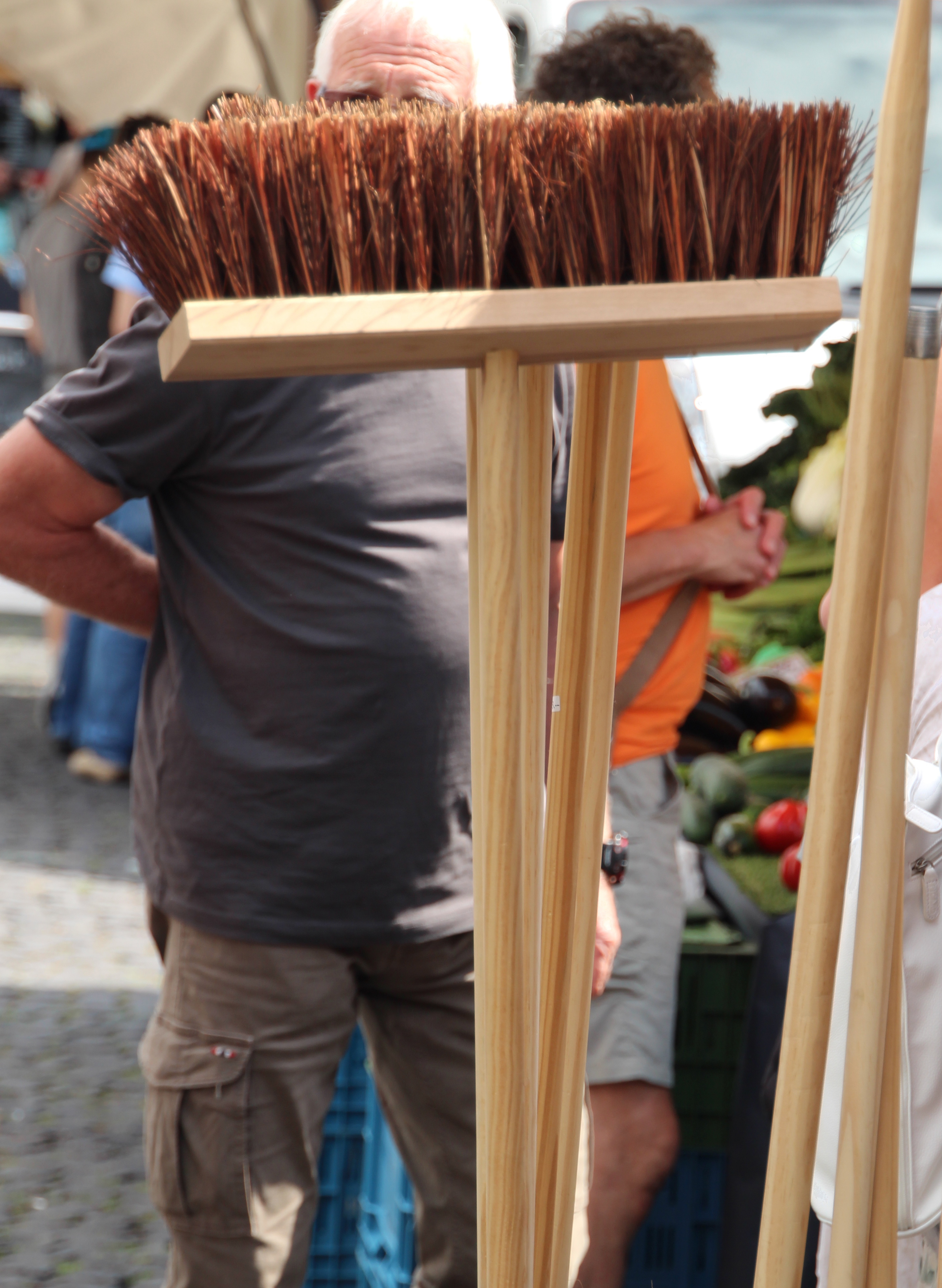 Bildinhalt: Ein Piassava-Besen auf dem Offenbacher Markt Aufnahmeort: Offenbach, Deutschland